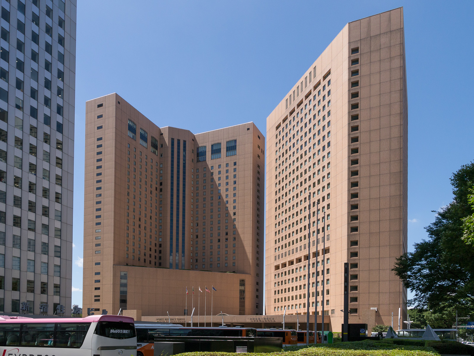 ハイアットリージェンシー東京、東京都新宿区西新宿。